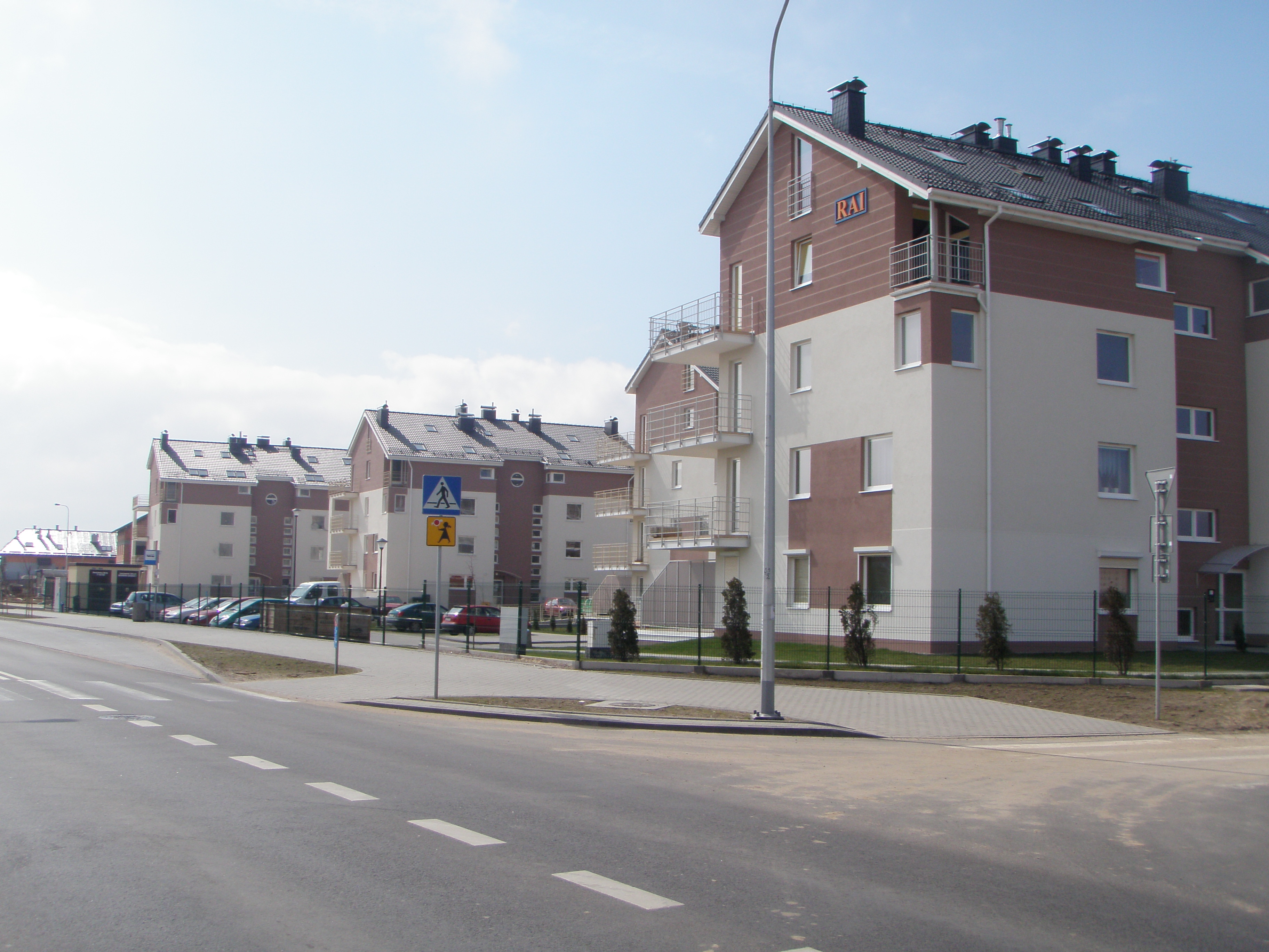 Gdańsk, ul. Wodnika.